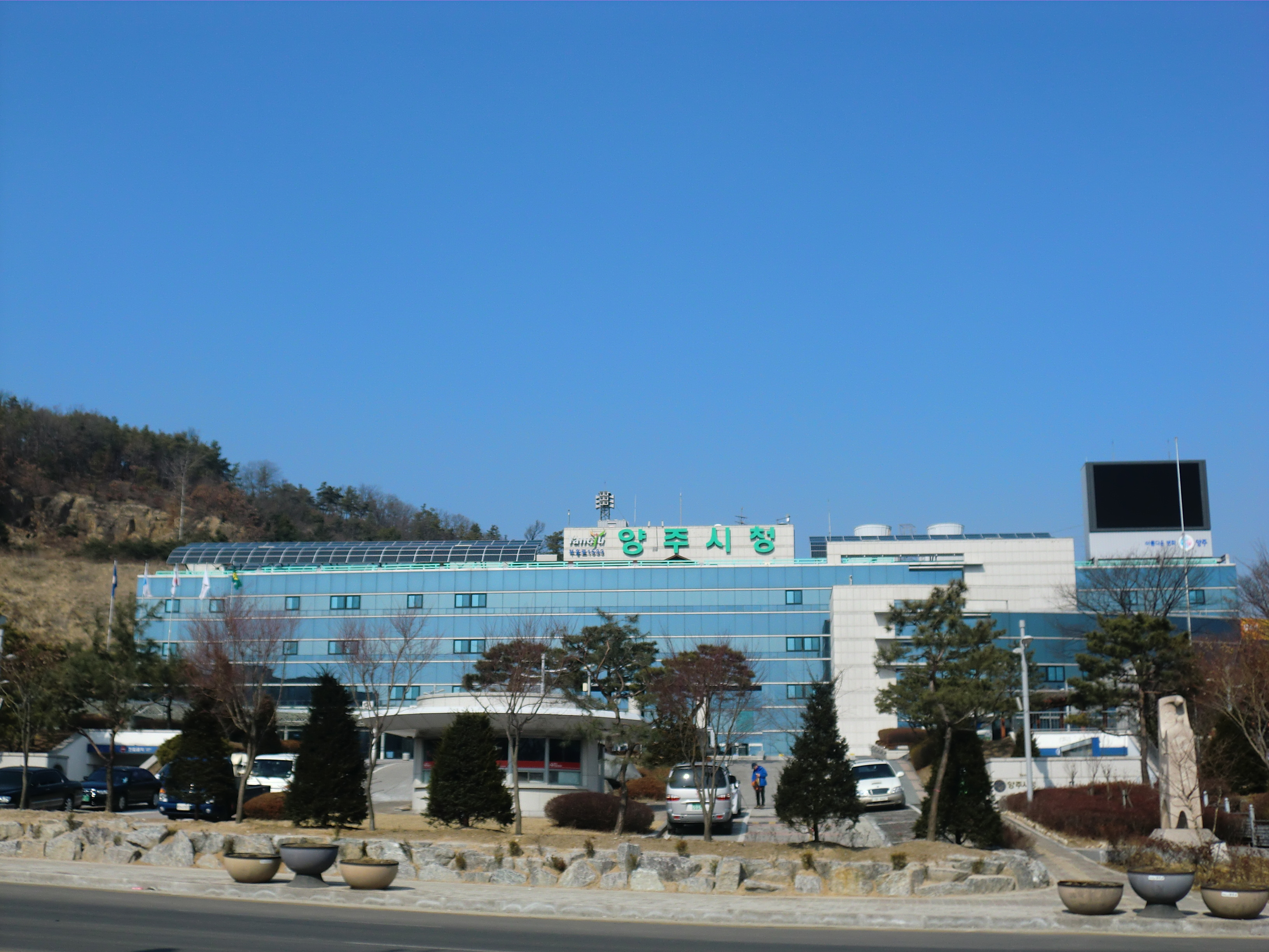 경기도 양주시에 있는 양주시청